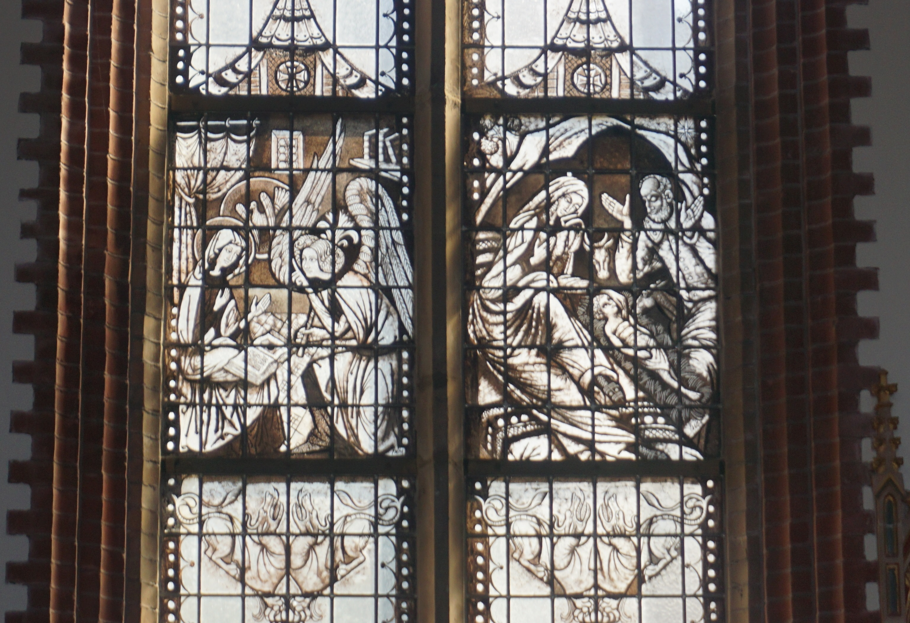 Raam in St. Nicolaasga